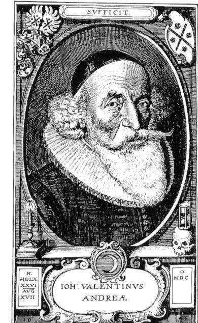 Johann Valentin Andreae w wieku 62 lat. Author: Wolfgang Kilian (1581-1662/63)